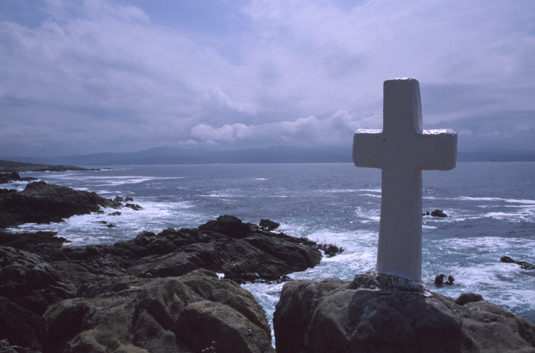 Cabo Roncudo, Corme